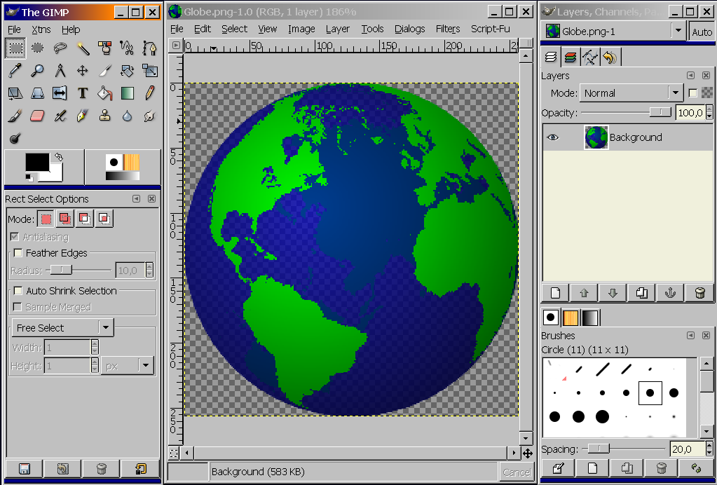 Izgled GIMP 2.0.1 na Win 2000. Pripravil xJaM.